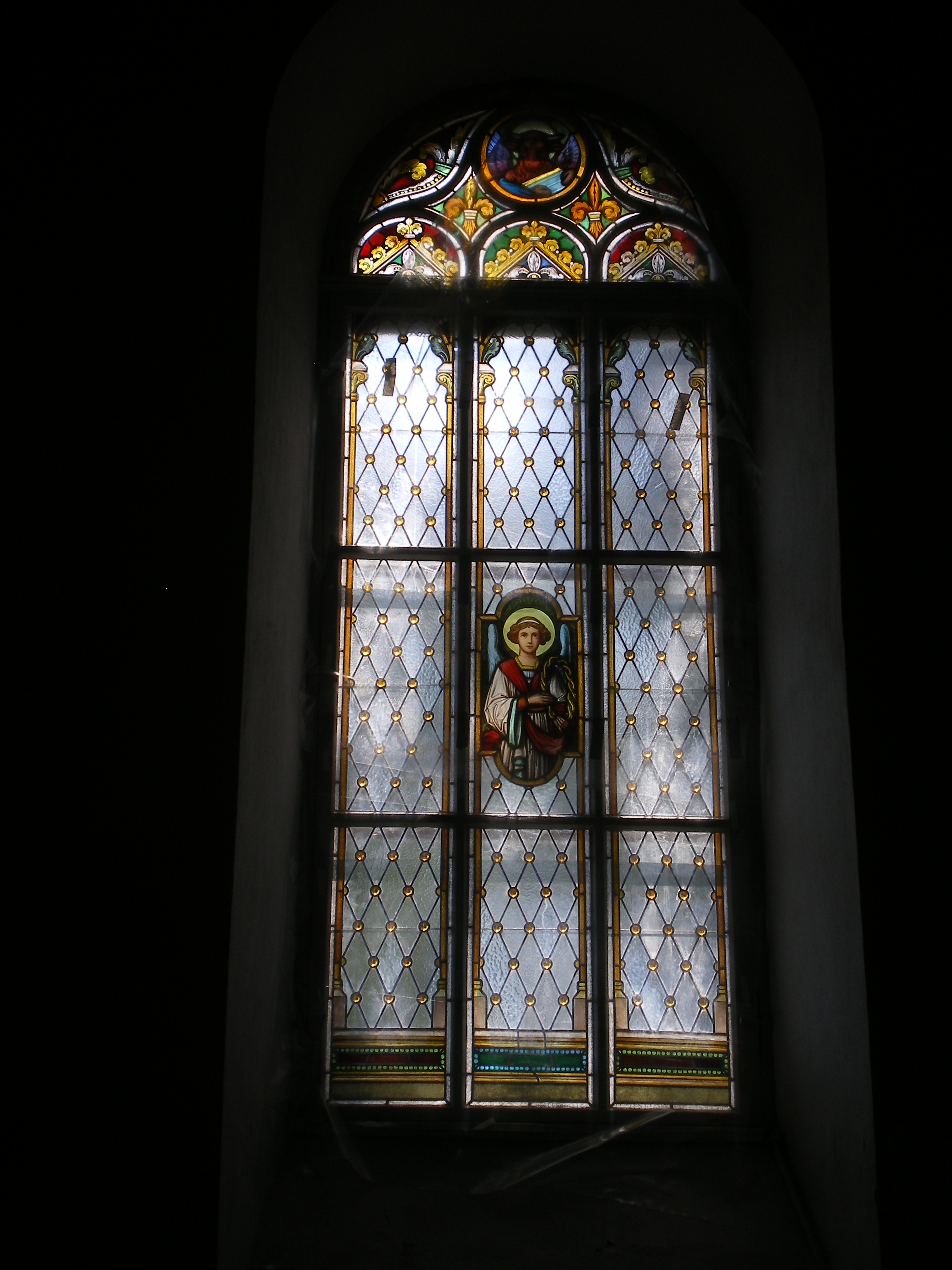 Vitraaž Paide kirikus